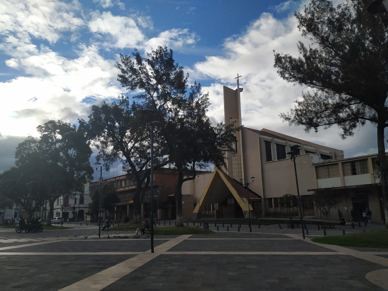 Vista diagonal hacia la iglesia